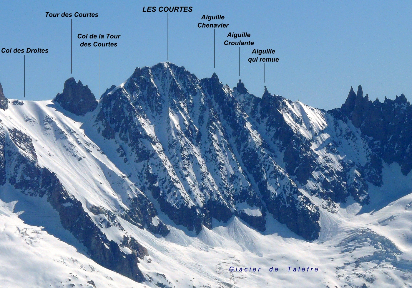 Les Courtes viste da sud dal ghiacciaio di Talèfre - Massiccio del Monte Bianco